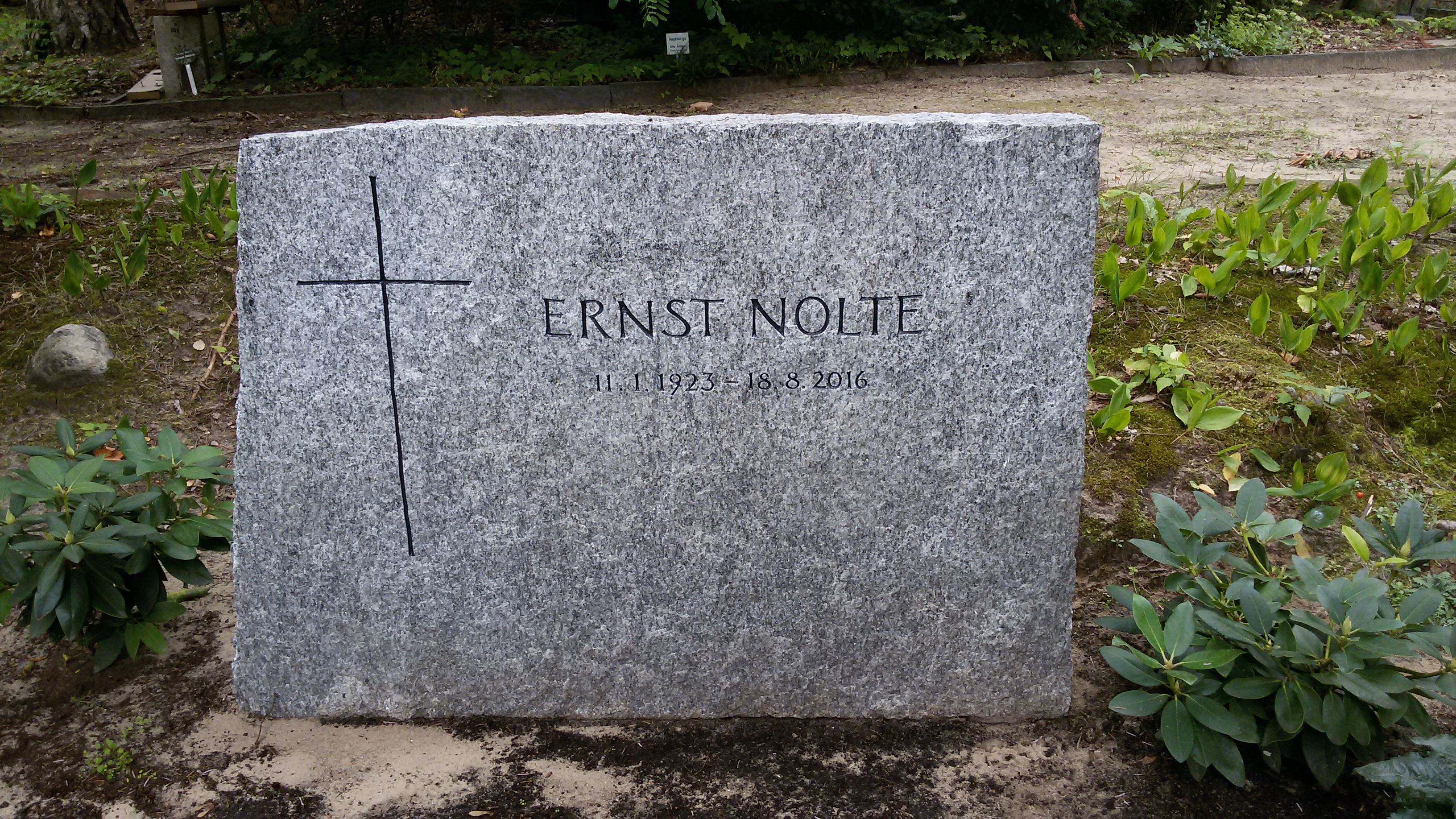 Grabstein des Historikers Ernst Nolte auf dem Friedhof der St. Matthiasgemeinde (Berlin-Tempelhof)